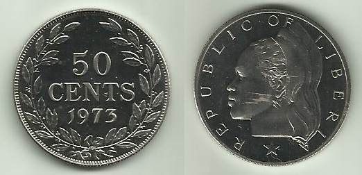 Moneda de 50 centavos, Liberia.